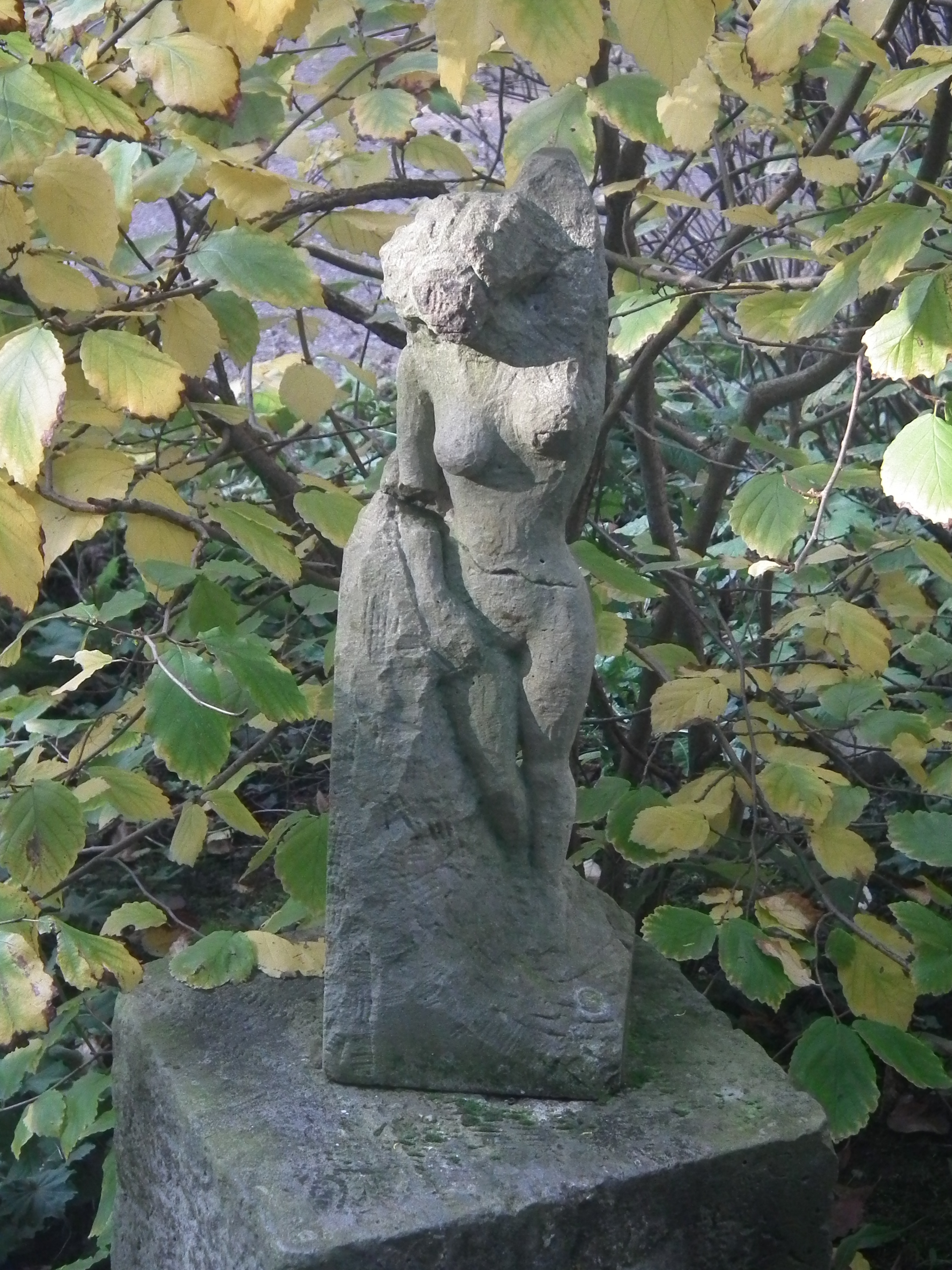 Gymnasium Dresden-Plauen, Schulpark, Kunst